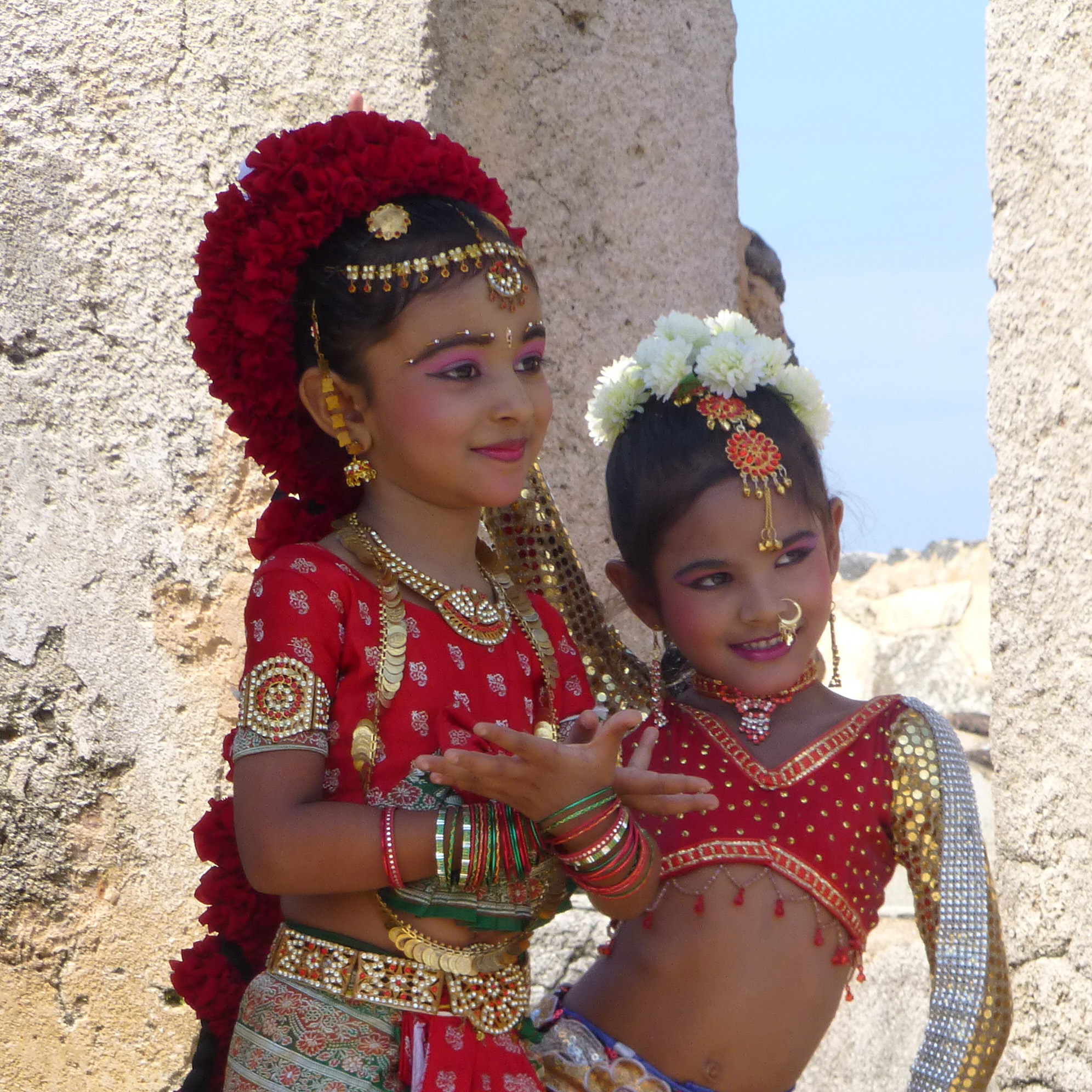 Sri Lanka : séance de pose pour les élèves d'une école de danse dans l'enceinte du fort de Galle